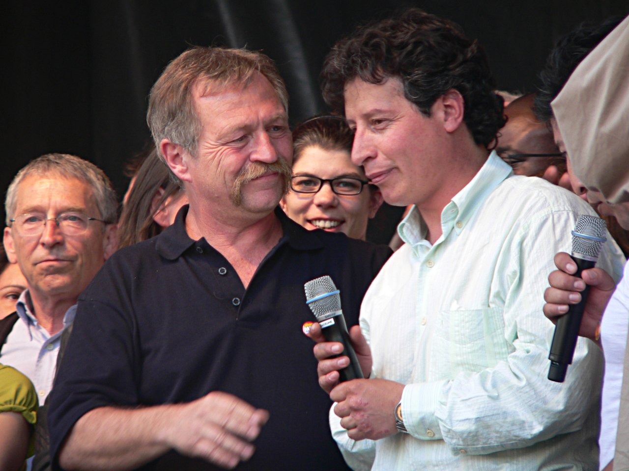 José Bové (French 2007 presidential candidate) and César Navarro Miranda, envoy from Bolivian president Evo Morales. Morales supports Bové.